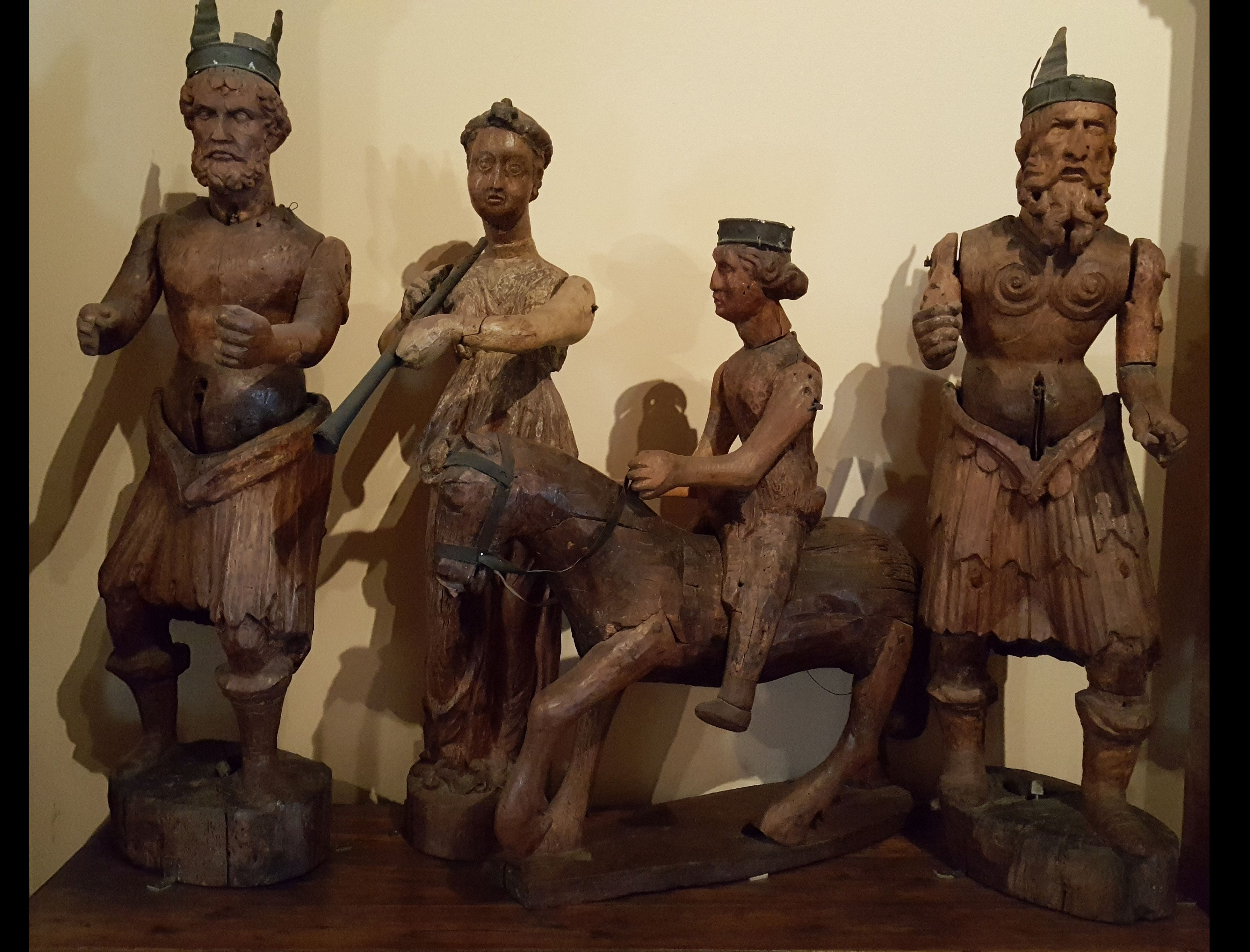 Statue del carosello dell'orologio This is a photo of a monument which is part of cultural heritage of Italy.